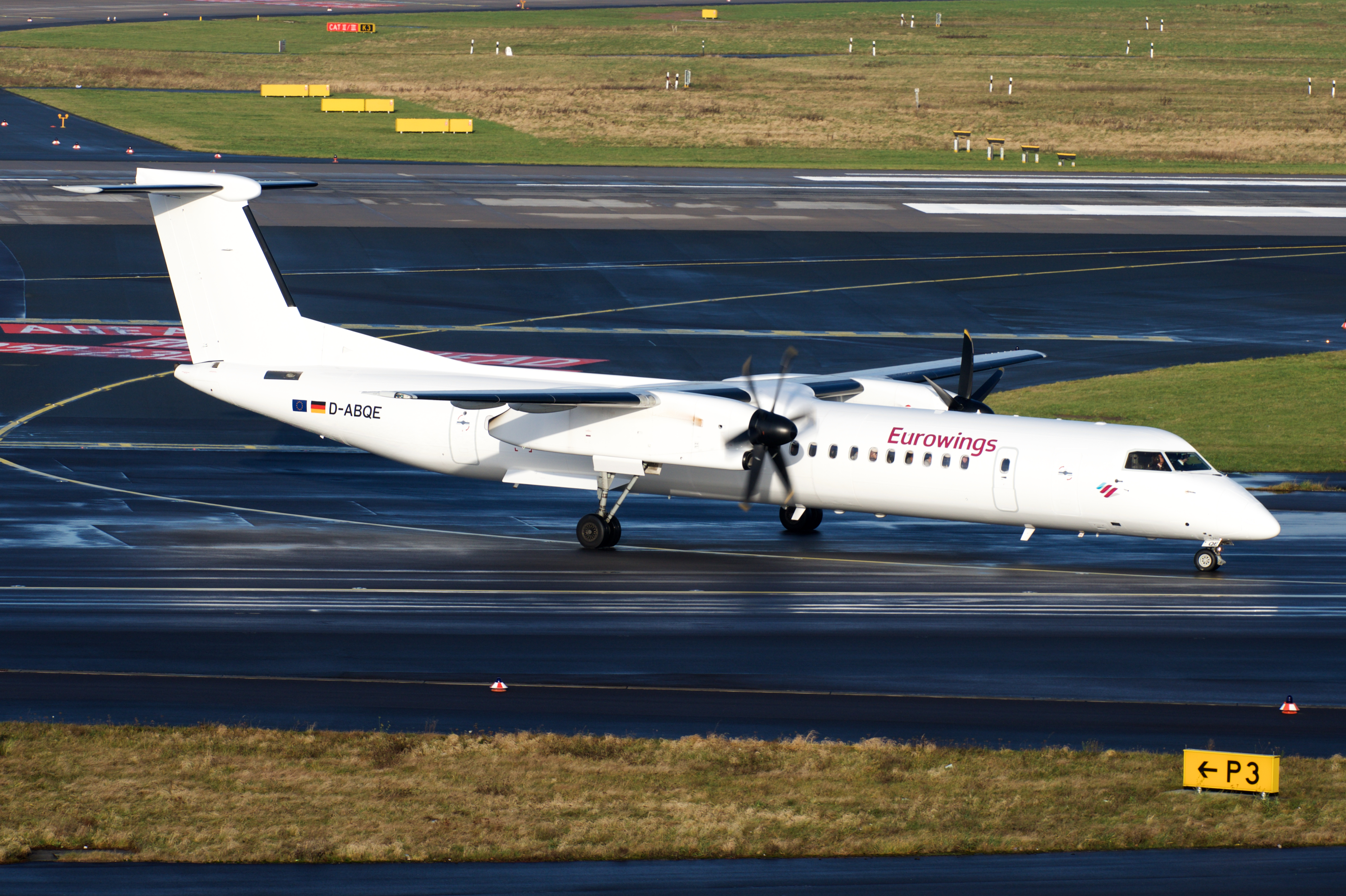 Eurowings Bombardier Q400 D-ABQE